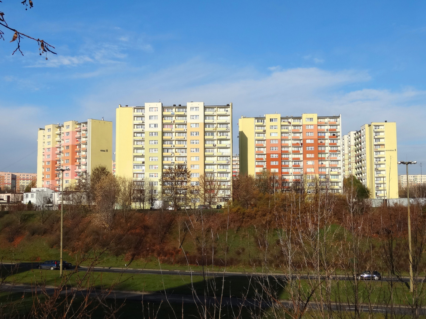 Widok z Wyżyn na osiedle Wzgórze Wolności w Bydgoszczy